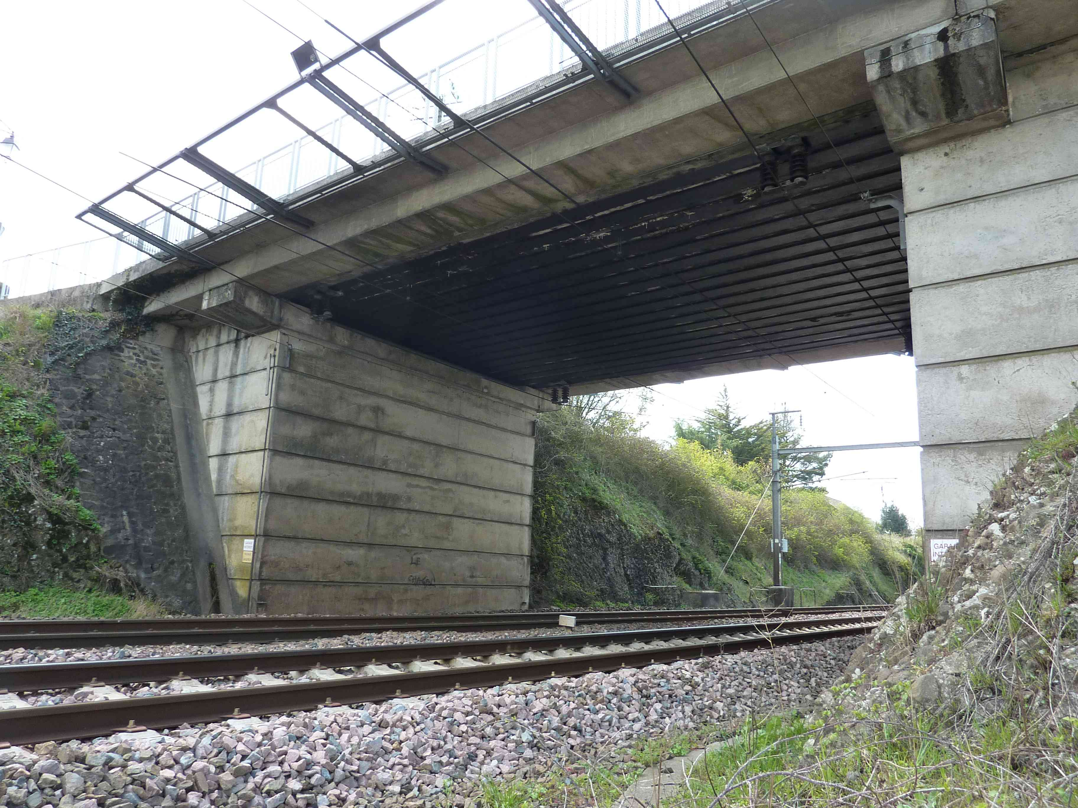 Pont ferroviaire à poutrelles enrobées à Ingrandes-sur-Loire (France) sur la ligne ferroviaire Angers-Nantes